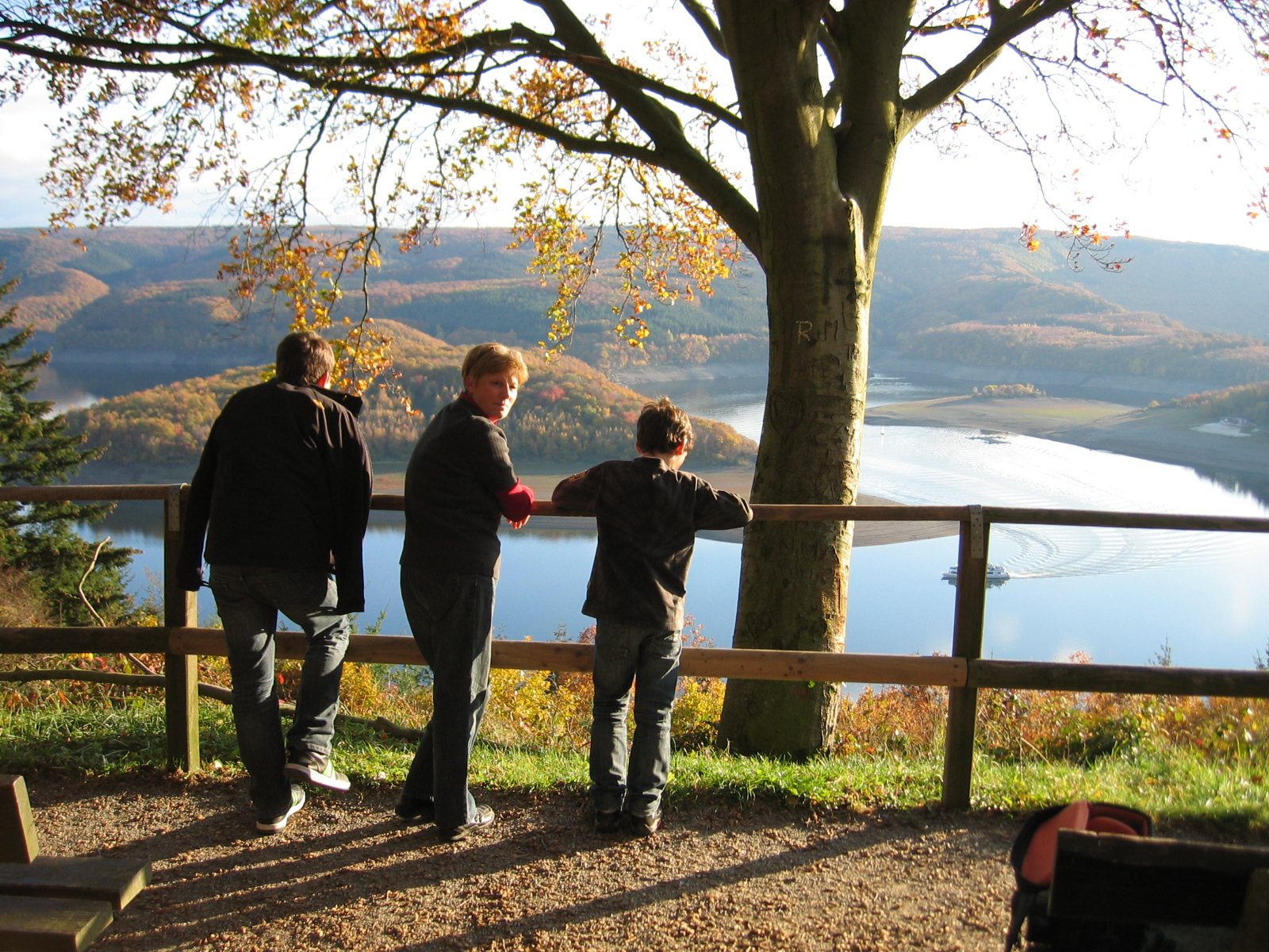 Rursee im Herbst 2011, aufgenommen von der "schönen Aussicht" in Schmidt